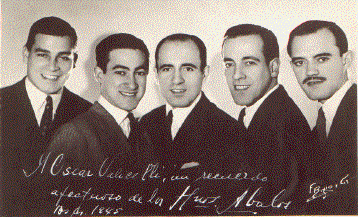 Foto autografiada del grupo musical folclórico argentino "Los Hermanos Ábalos"